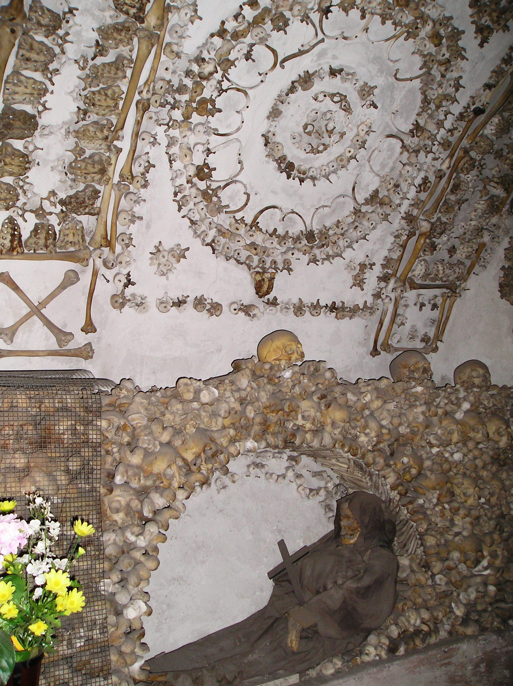 cripta Santa Maria della Concezione dei Cappuccini